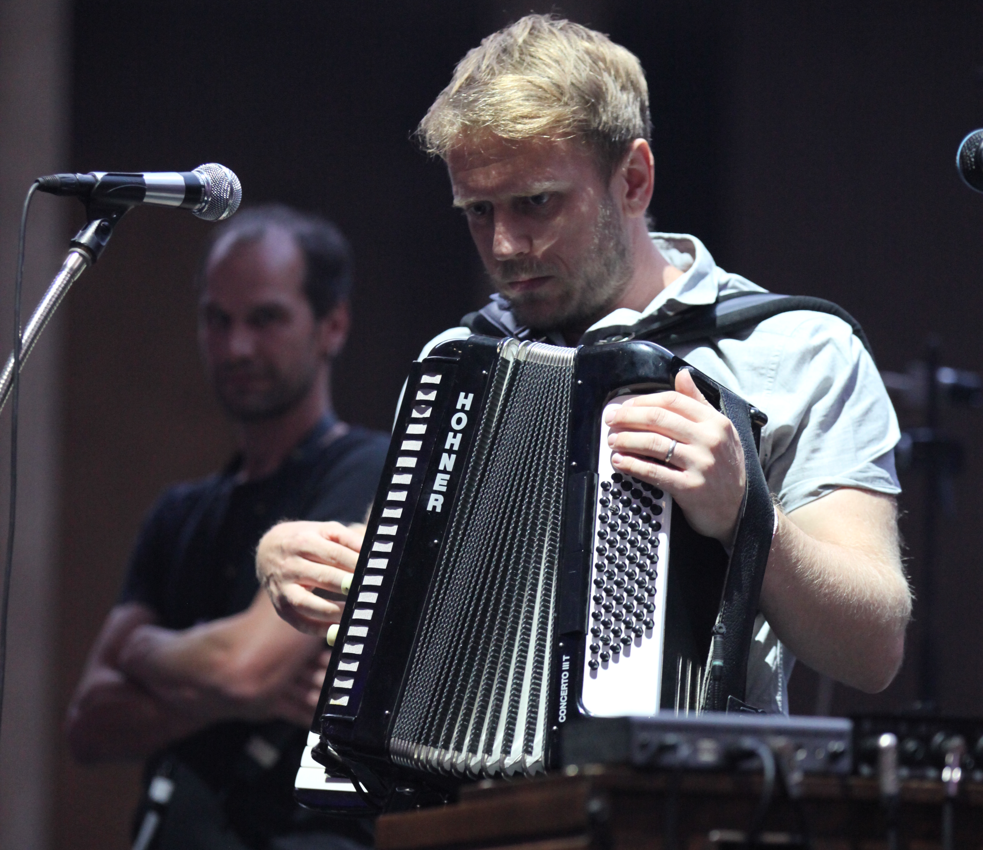 garish auf dem Heimatsound-Festival 2015 in Oberammergau Thomas Jarmer